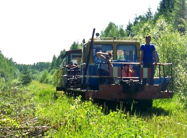 Пассажирский поезд из автодрезины (мотовоза) и пассажирского вагона на Монзенской ЖД